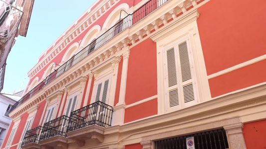 Palazzo Capone-Spalluti dopo i restauri effettuati nel 2015.